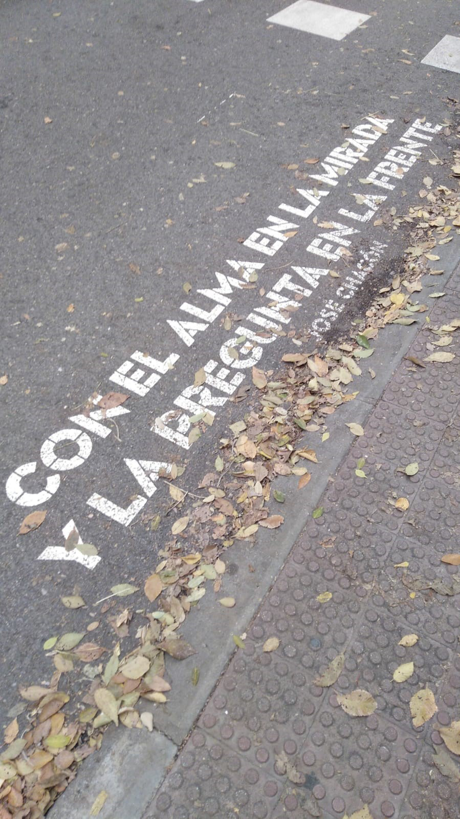 "Con el alma en la mirada y la pregunta en la frente". Frase del poeta José Chacón, pintada en el paso de peatones situado en la calle General Álvarez de Castro, nº 9, de Madrid (España). Forma parte de la iniciativa poética "Versos al paso", organizada por el Ayuntamiento de Madrid.[1]